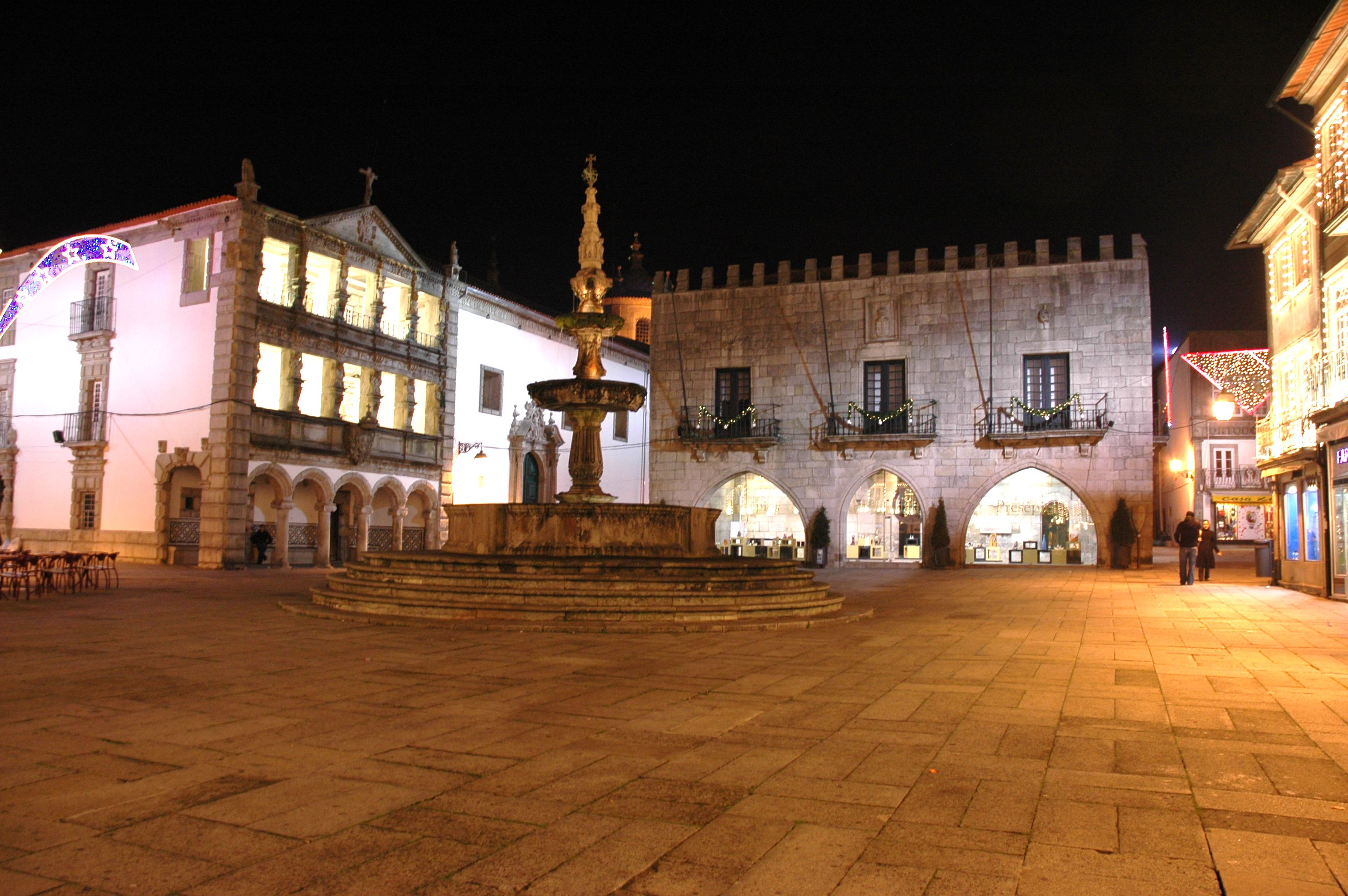 Viana do Castelo - Praça da República